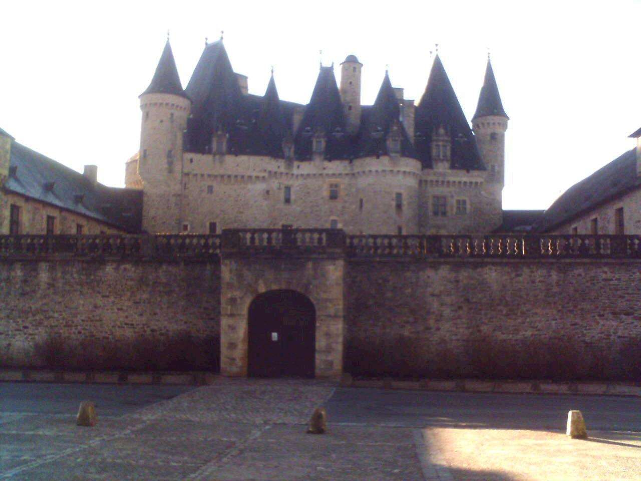 Das Schloss von Jumilhac-le-Grand, Dept. Dordogne, Frankreich.